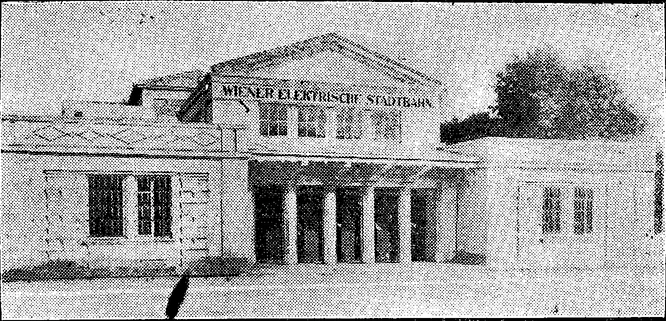 Berichterstattung zur Eröffnung der Wiener elektrischen Stadtbahn